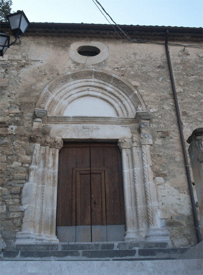 Chiesa di San Silvestro a Bagnoli del Trigno (IS)